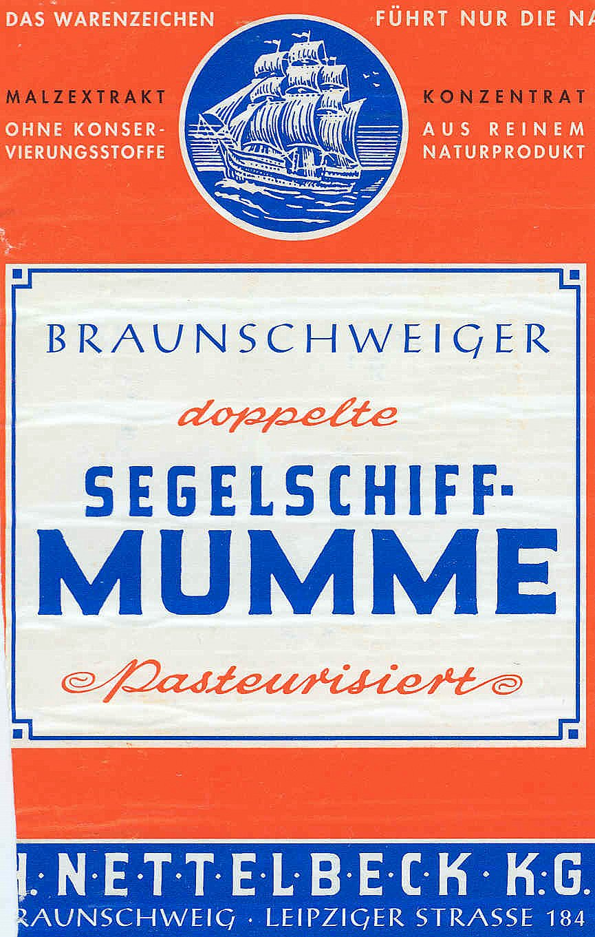 Braunschweiger Mumme: Dose von 1999